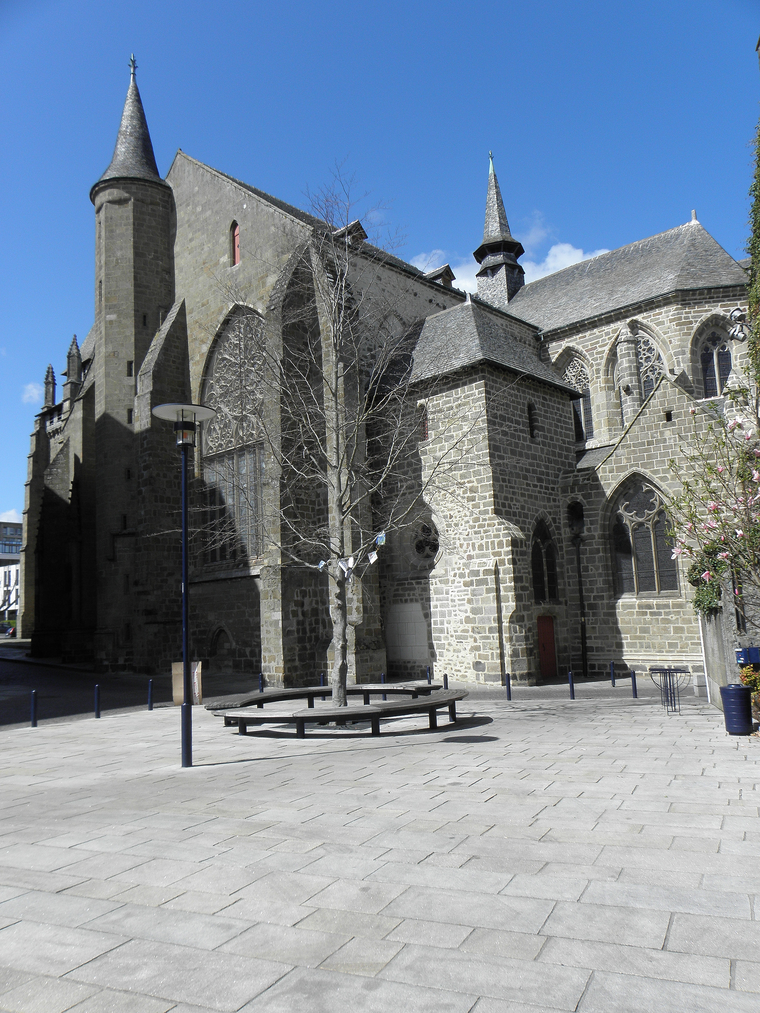 Transept sud et chœur de la cathédrale Saint-Étienne de Saint-Brieuc (22).